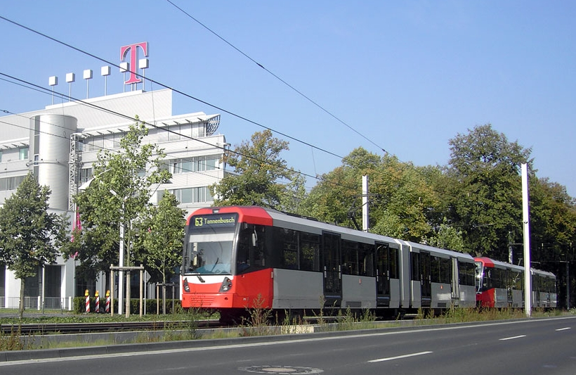 Bonner Stadtbahnwagen 0372 vor der Konzernzentrale der Deutschen Telekom